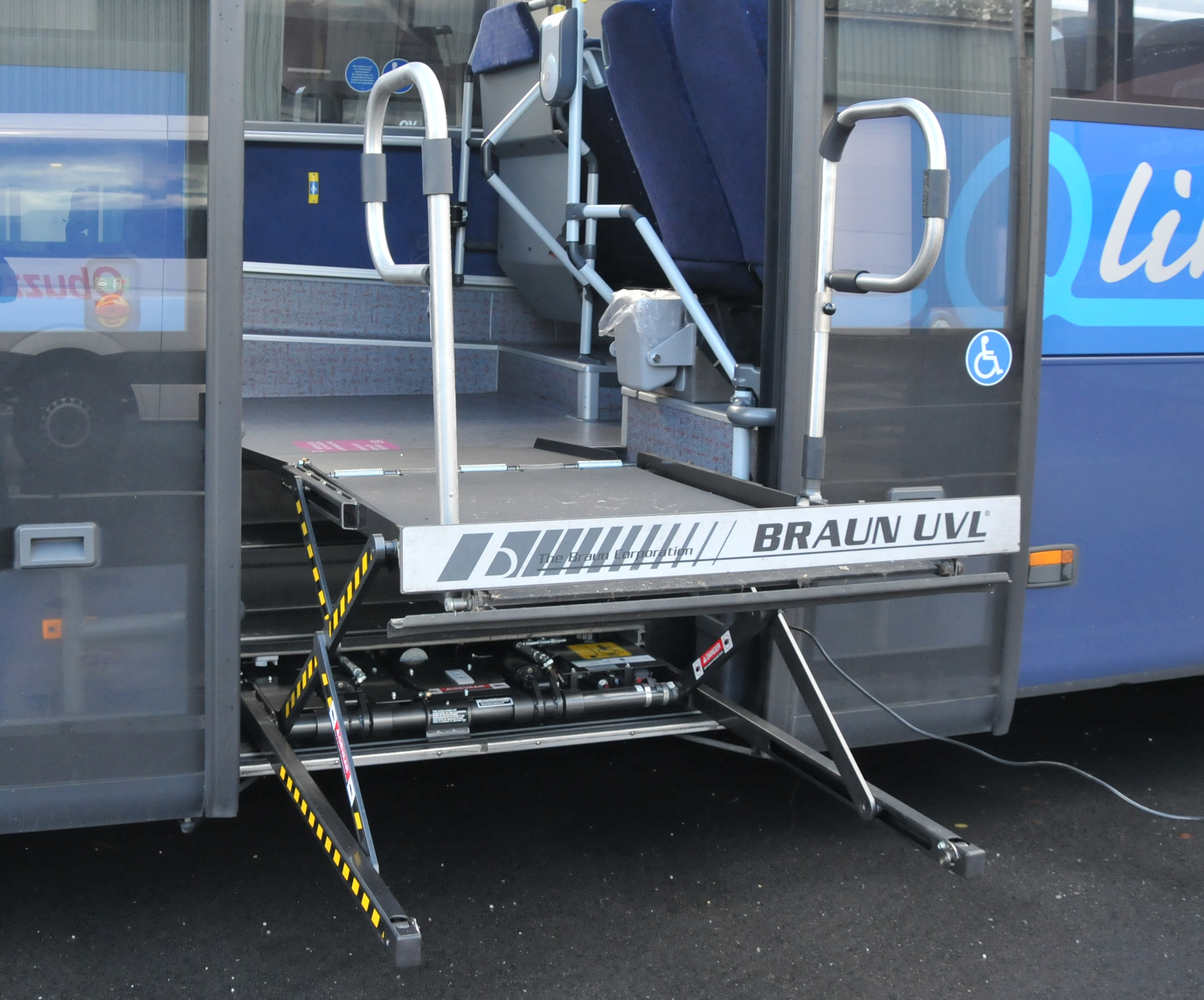 Rolstoellift van het type Baun UVL toegepast bij Qbuzz bussen van het type Mercedes-Benz Integro.